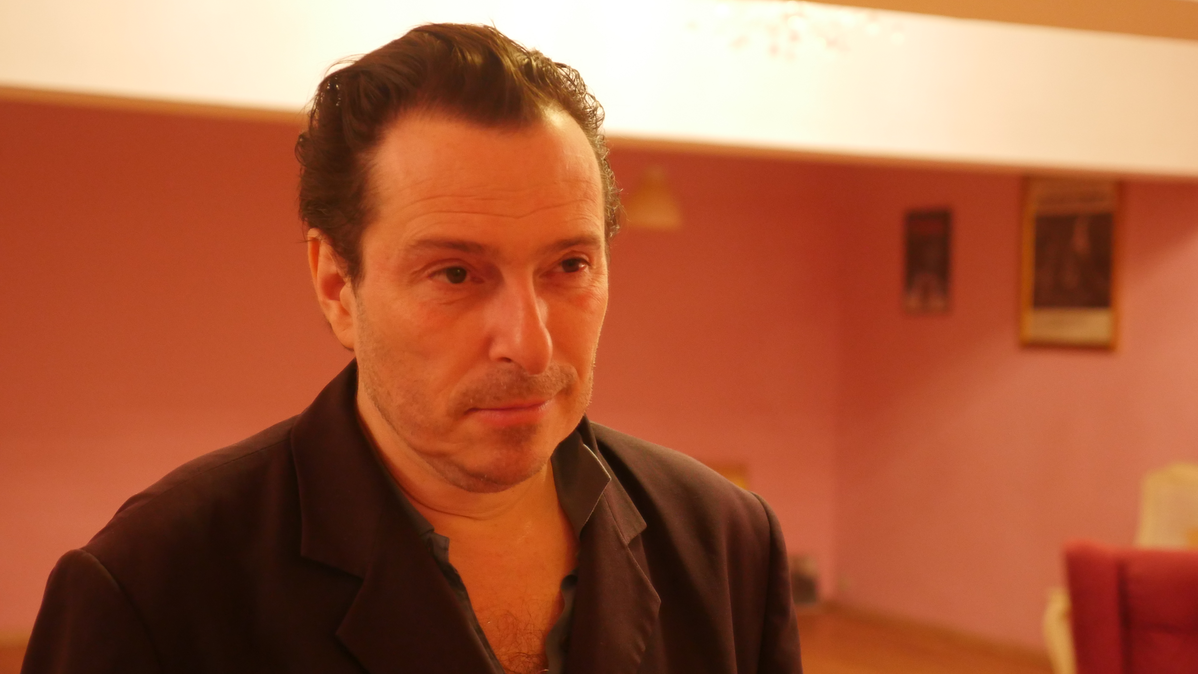 Fotografía de Héctor en su estudio